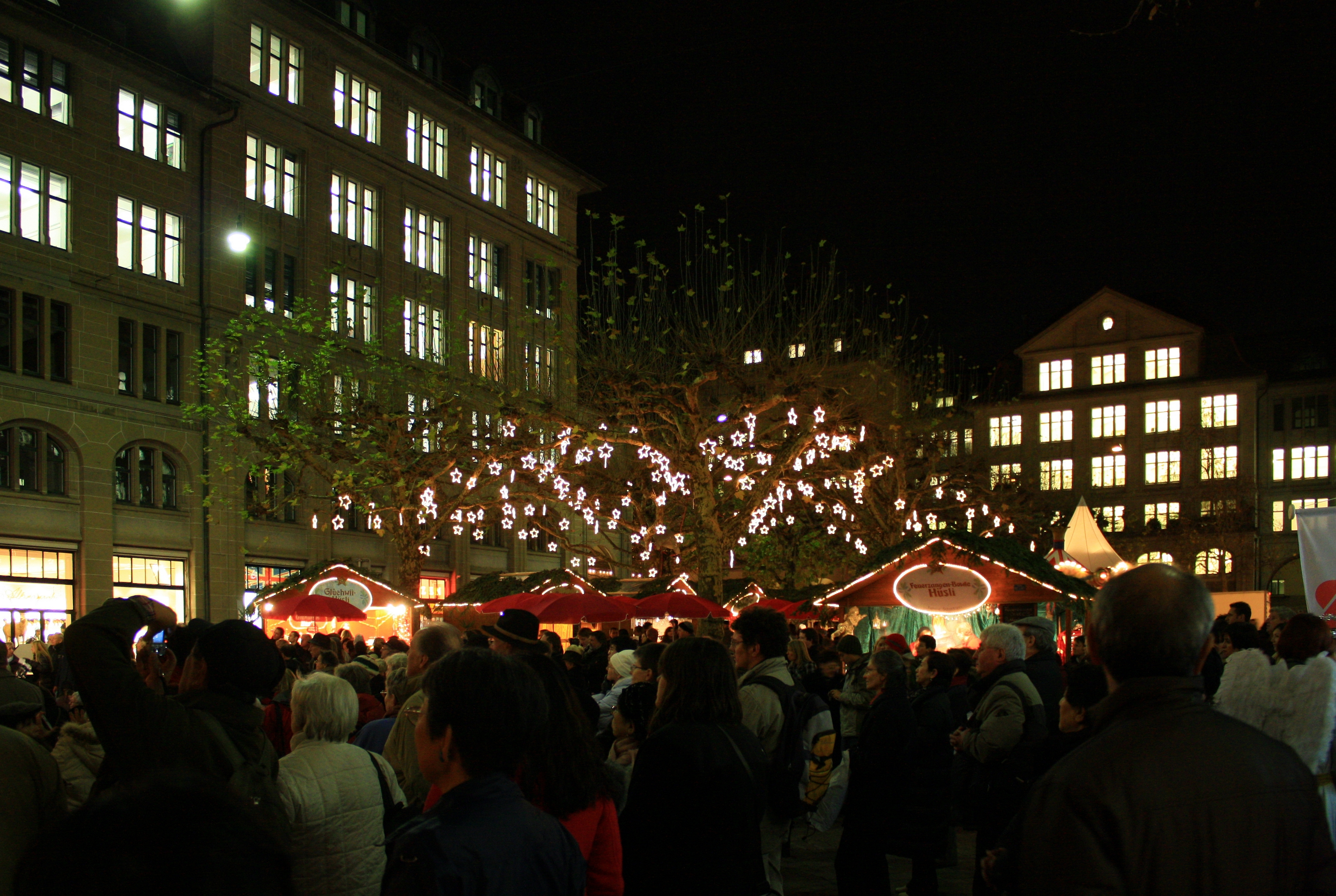 Werdmühleplatz in Zürich (Switzerland), Uraniastrasse in the background.